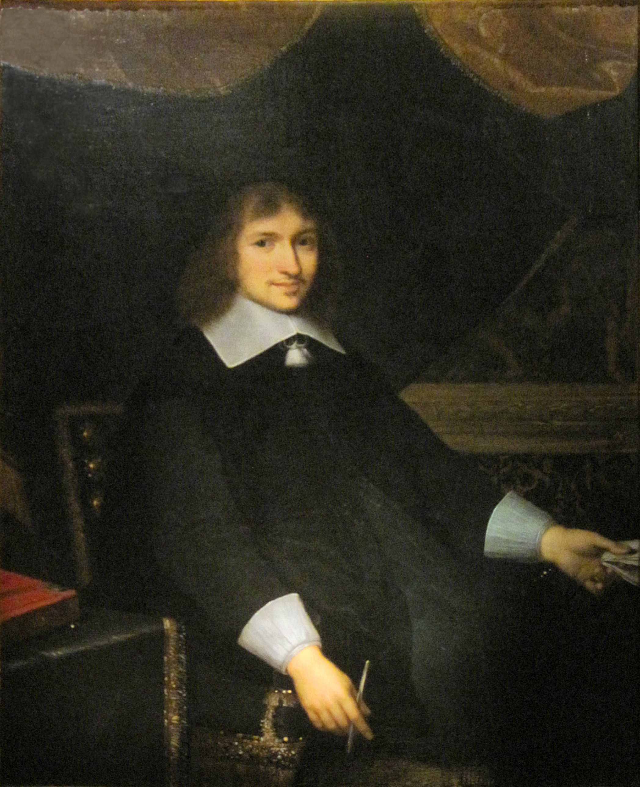 Portrait de Nicolas Fouquet (1615-1680)